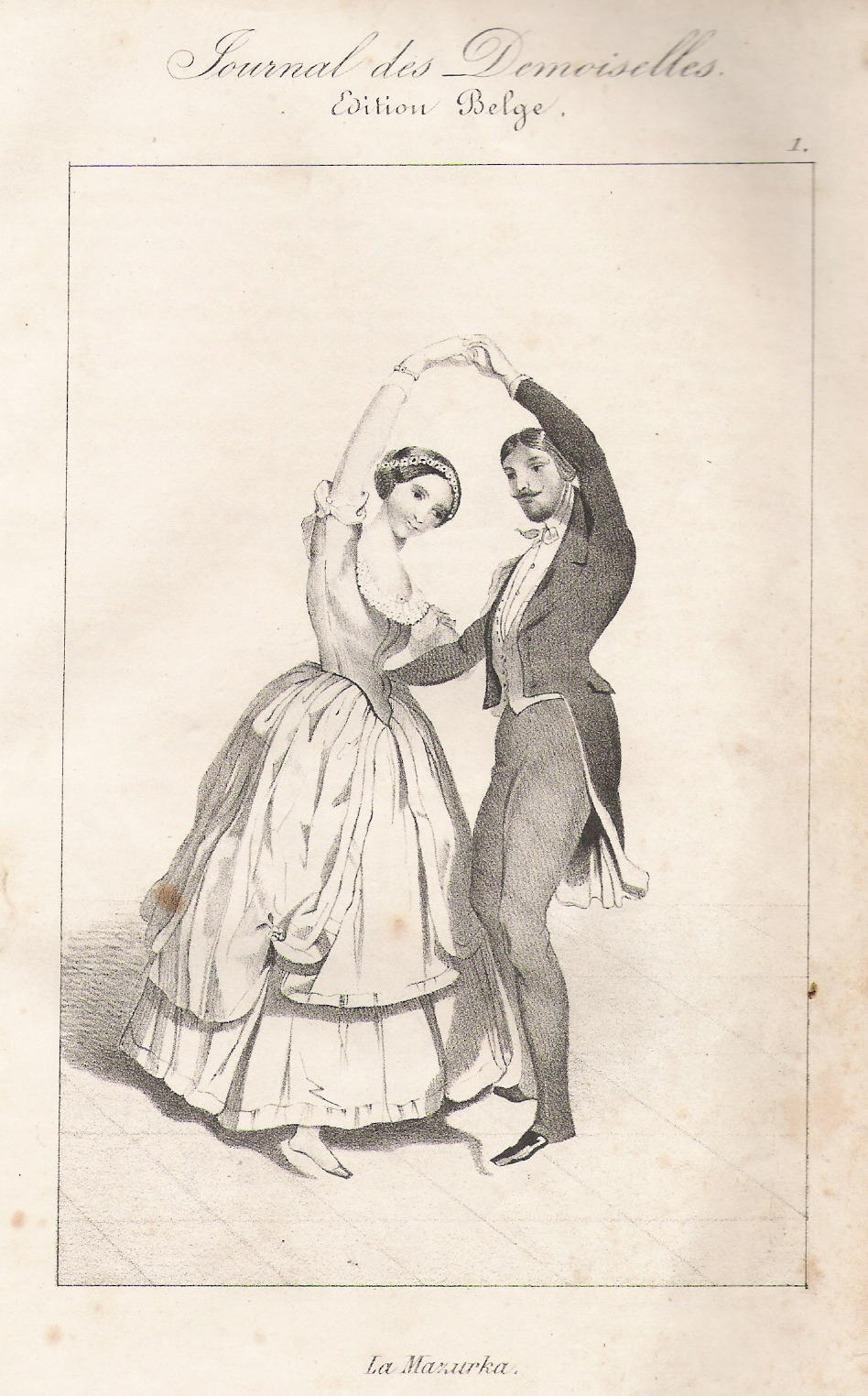 Mazurka